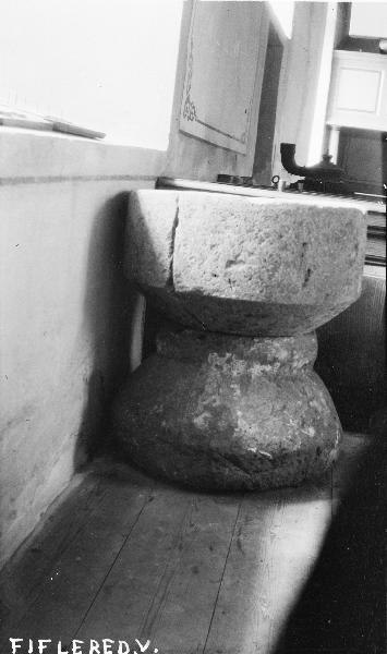 Dopfunt av sandsten, från omkring 1200. Snabbinv. Kategori: (04) DopfuntarDopfunt av sandsten, från omkring 1200. Snabbinv.